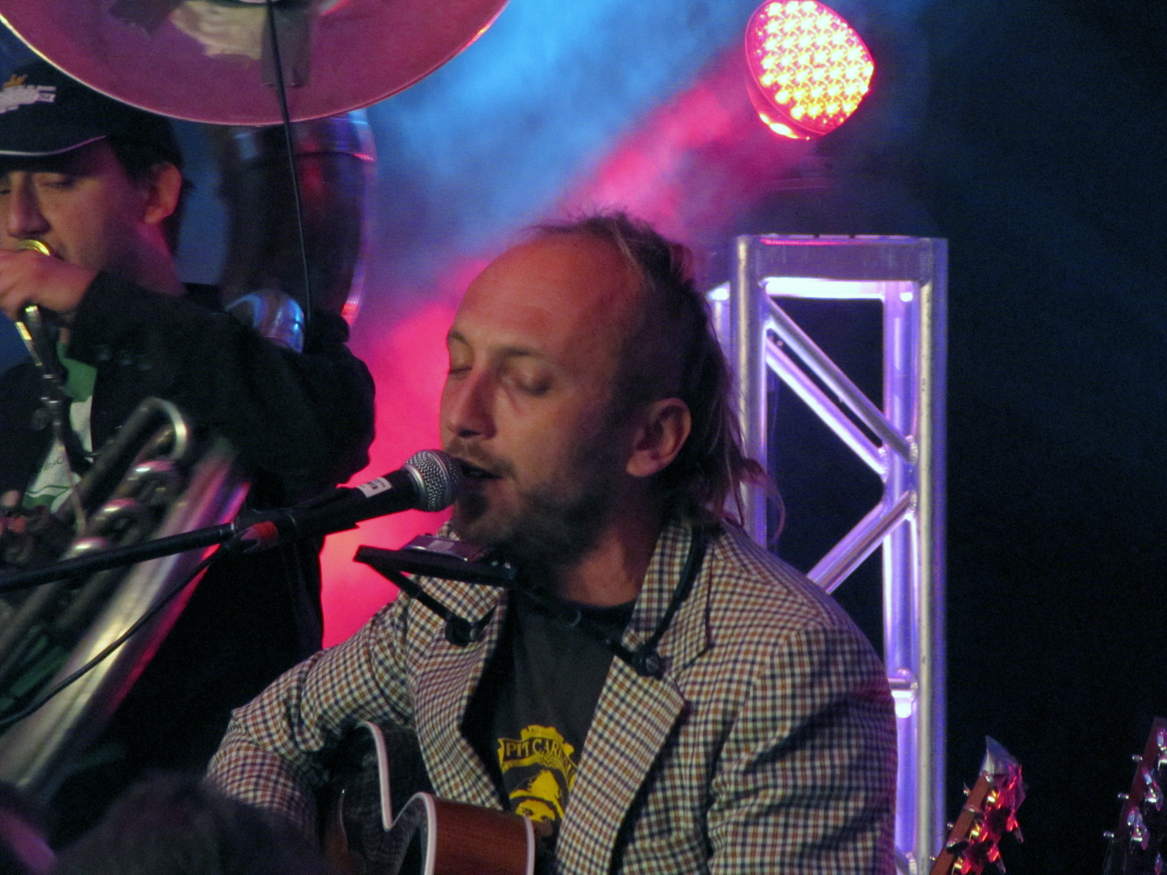 Spectacle de Bernard Adamus au Festival international de la chanson de Granby 2012, place Johnson, aux chapiteaux Desjardins.